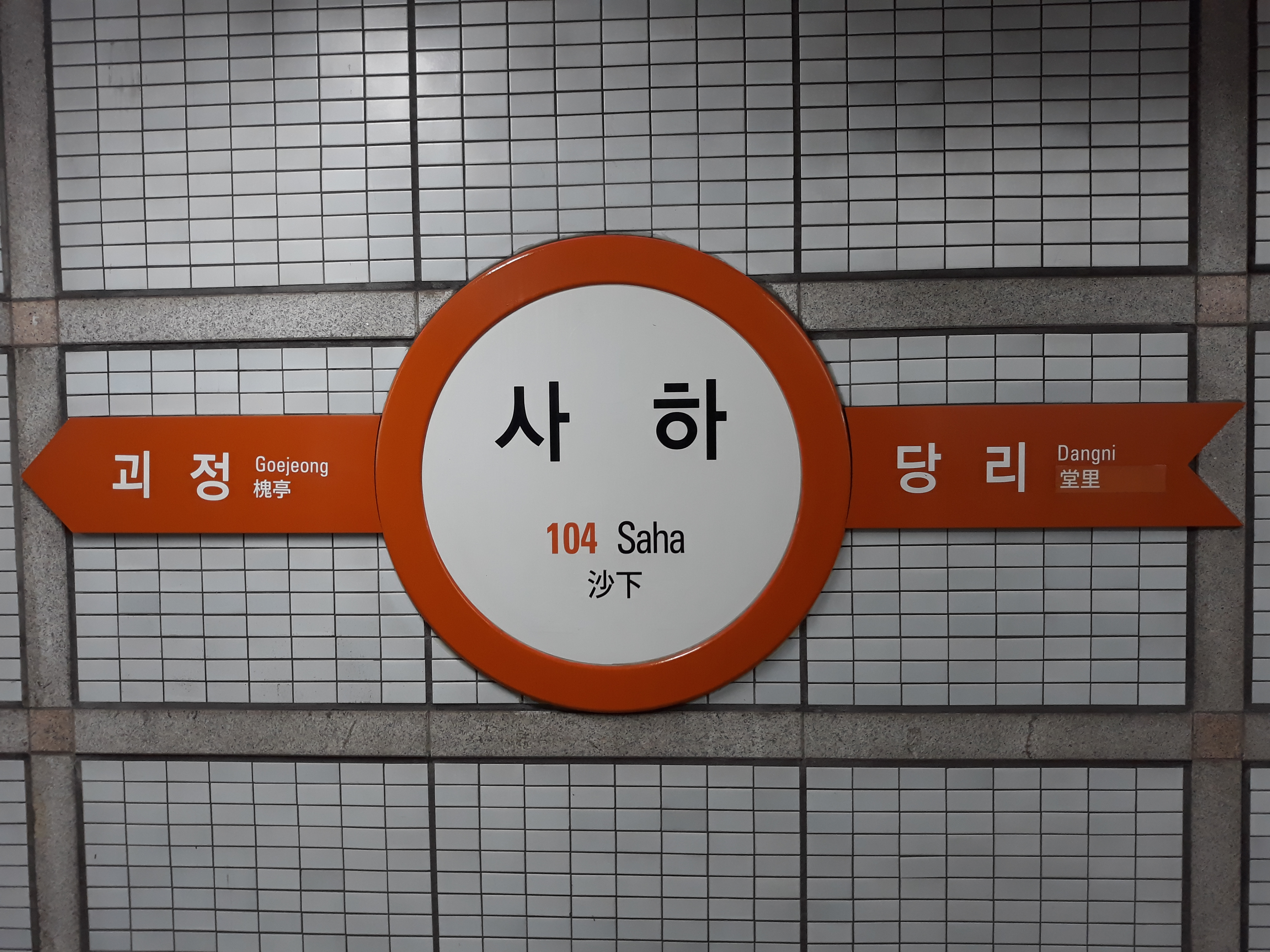 부산 도시철도 1호선 사하역 노포 방면 역명판